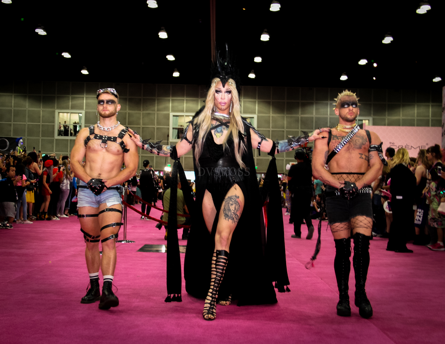 Rupaul DragCon 2019 - Los Angeles